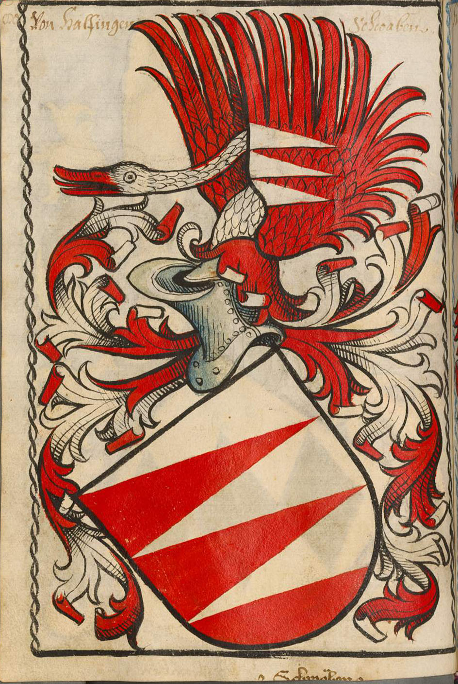 Scheibler'sches Wappenbuch, älterer Teil; Seite 80 Von Halfingen Schwaben